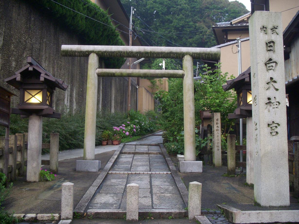 京都・日向大神宮鳥居